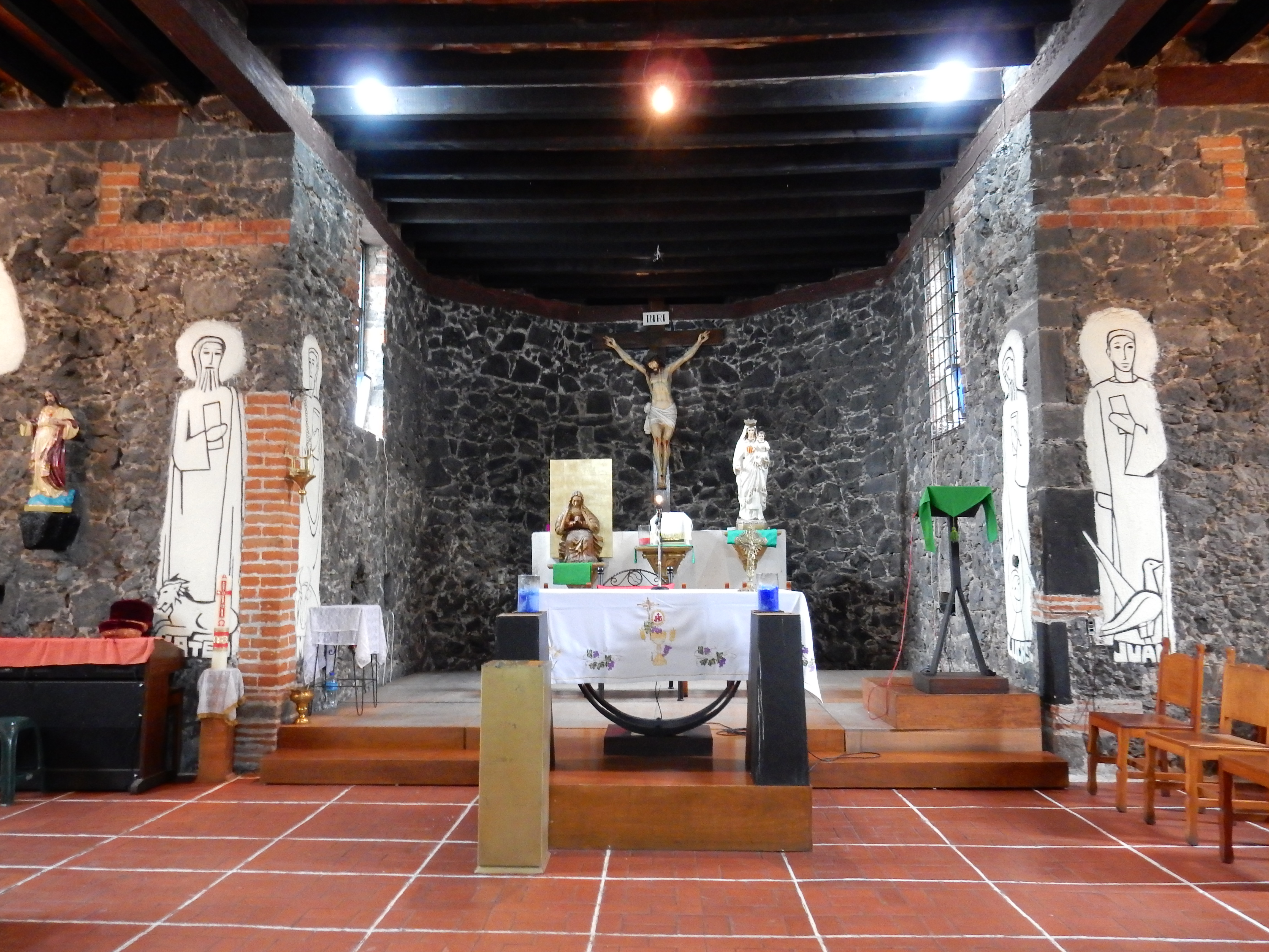 Vista frontal del altar de la Capilla del Calvario en el que podemos ver las diferentes figuras religiosas y los bajos relieves pintados en blanco.